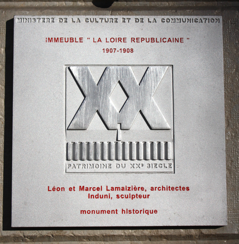 Patrimoine industriel du XX° siècle